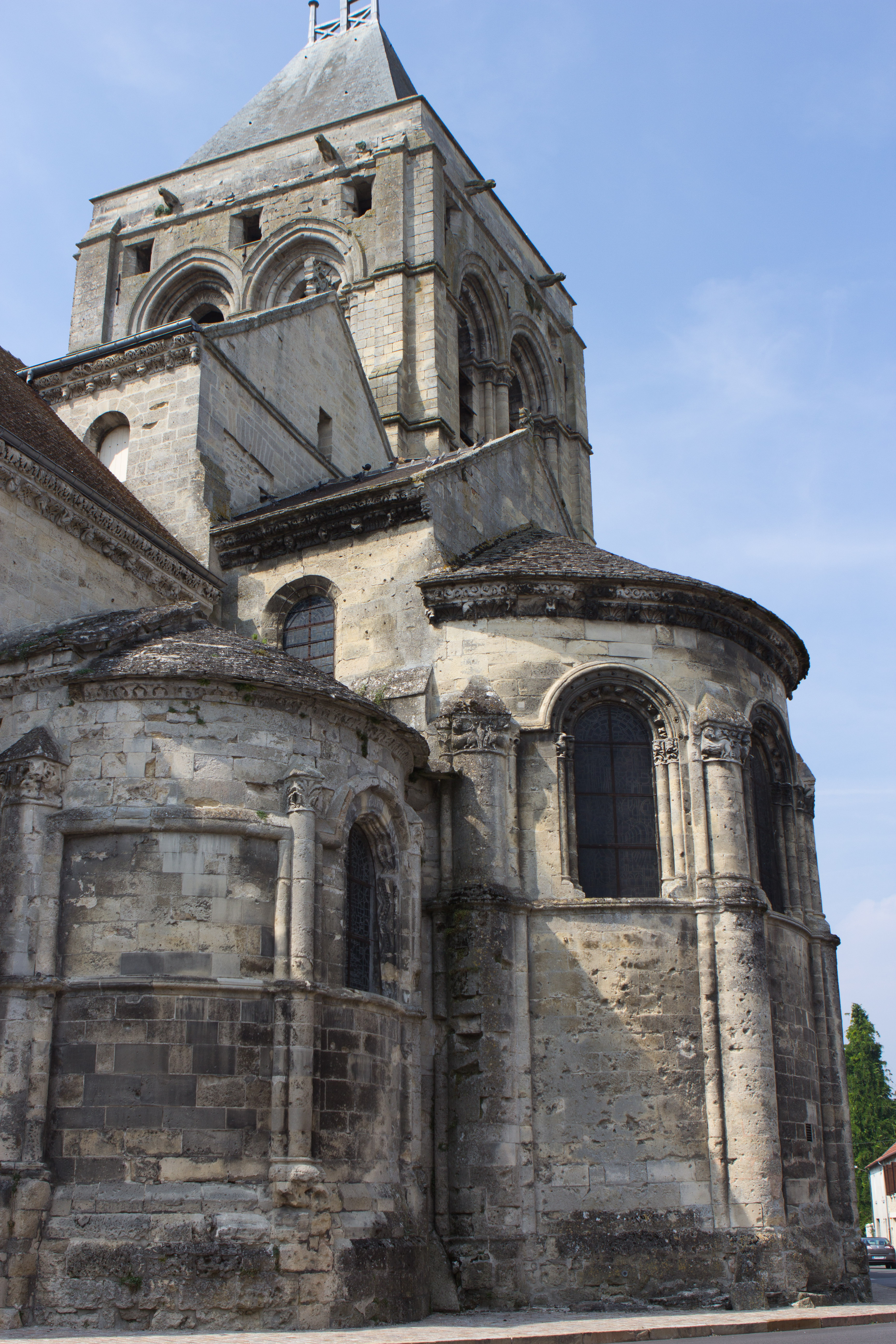 Église Notre-Dame de Bruyères-et-Montbérault / Bruyères-et-Montbérault, Aisne, France